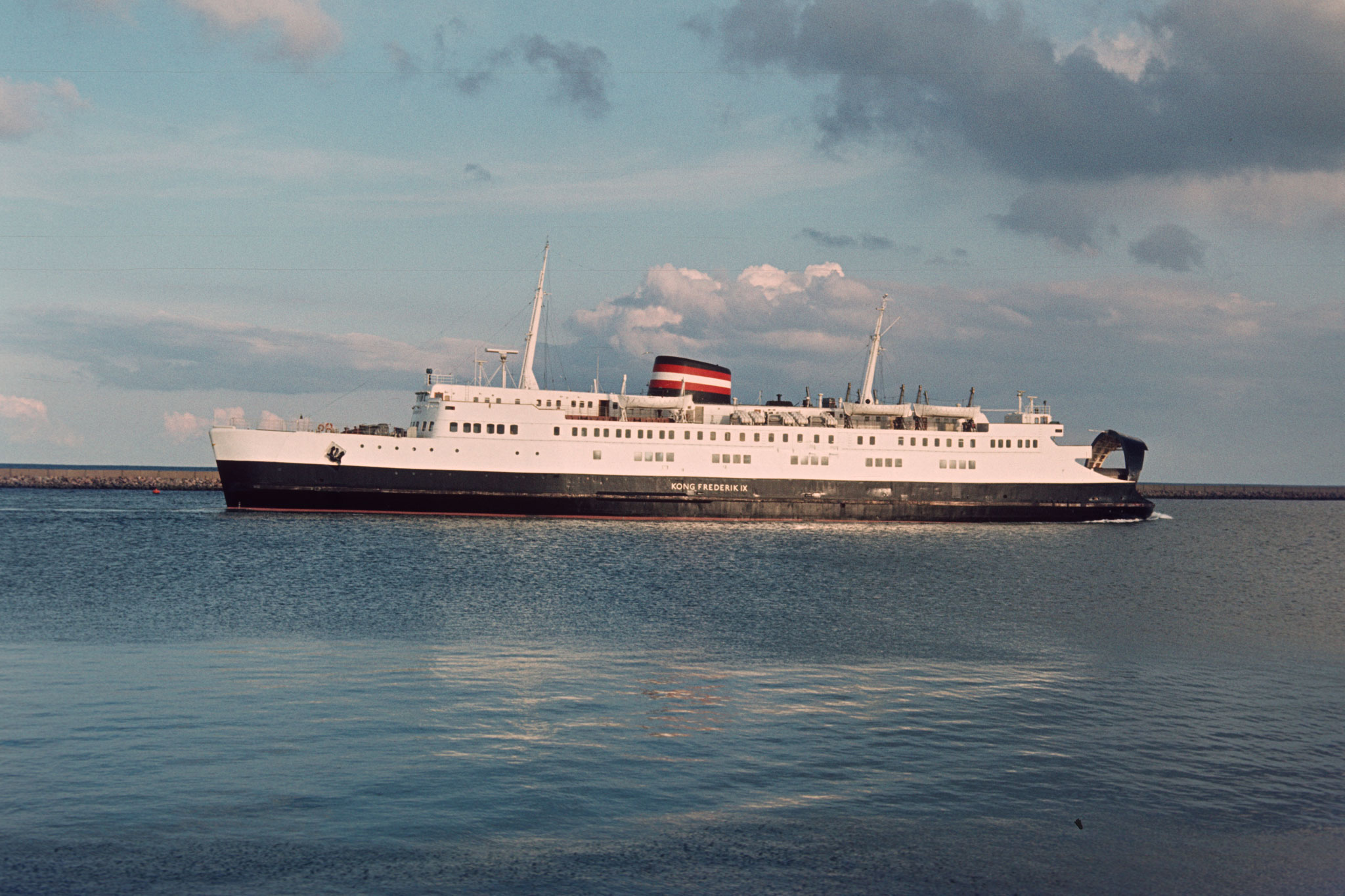 Fährschiff Kong Frederic IV auf der Vogelfluglinie Puttgarden - Roedby im Juli 1981